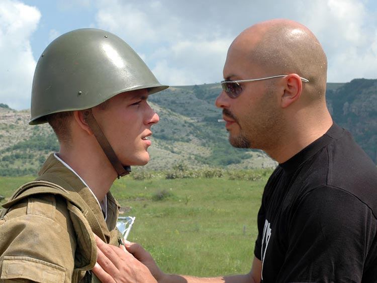 Фёдор Бондарчук и Константин Крюков на съемках фильма "9 рота" This work is free and may be used by anyone for any purpose. If you wish to use this content, you do not need to request permission as long as you follow any licensing requirements mentioned on this page.